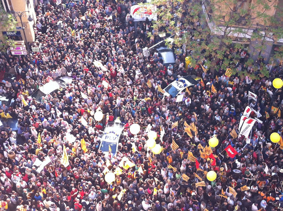 Manifestació d'Acció Cultural del País Valencià, ACPV, a favor de les emissions de TV3 al País Valencià, el 16 d'abril de 2011.